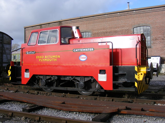 Restored Diesel Locomotive